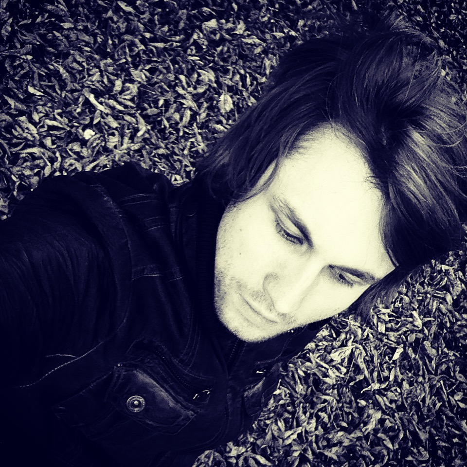 Manuel Schmid Promotion Musik